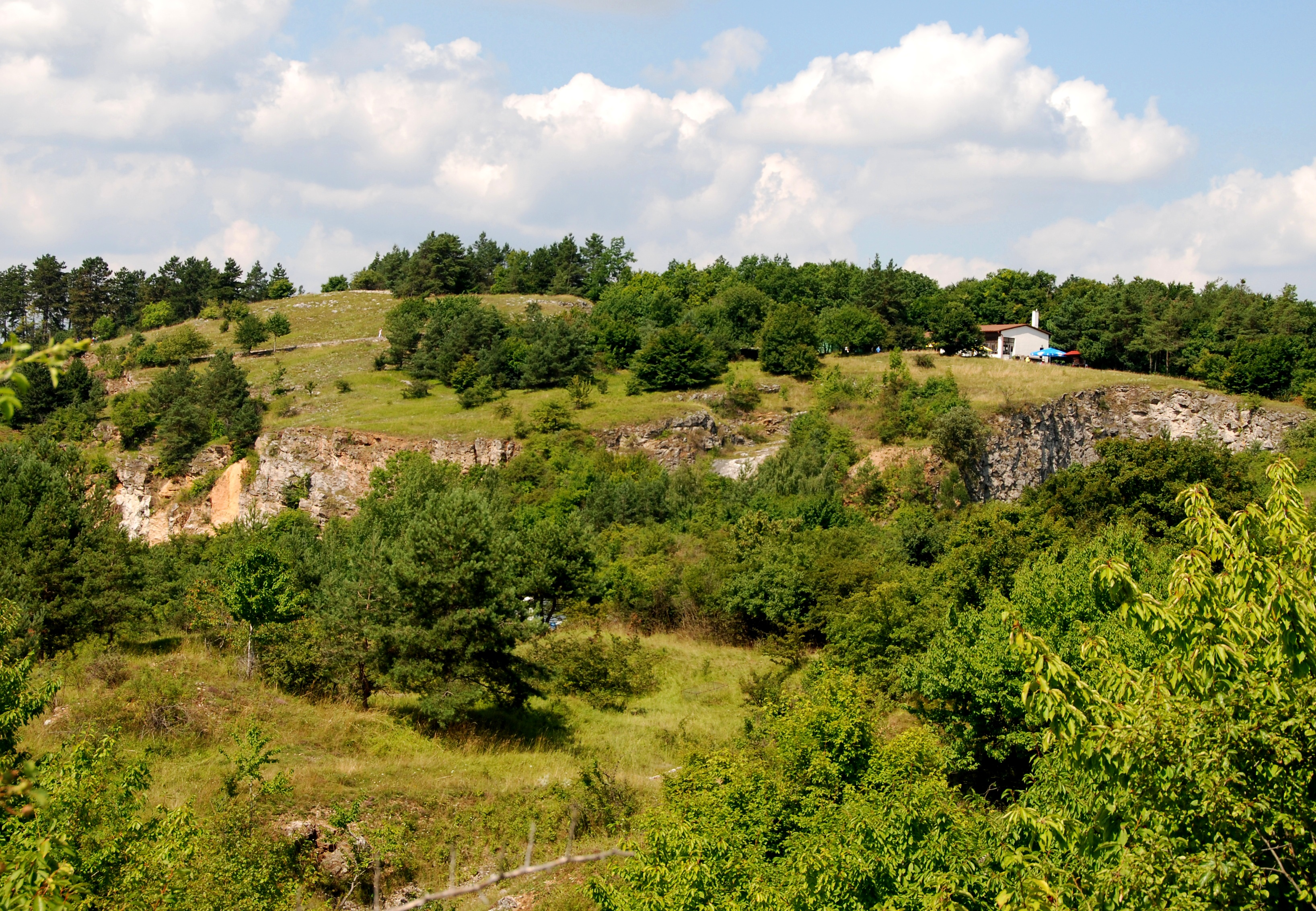 Zlatý kůň. Masiv, ve kterém se nachází Konepruská jeskyně